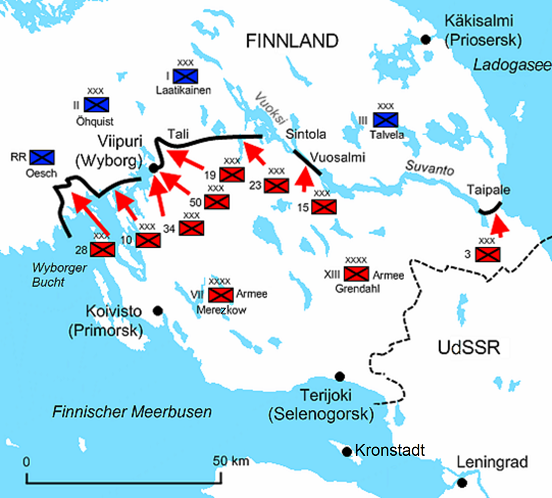 Karelische Landenge am 13. März 1940, dem letzten Tag des Winterkriegs (deutsche statt englischer Beschriftung in Karte von Benutzer Peltimikko)